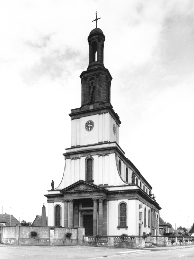 Vue sud-ouest de l'église de nos jours.